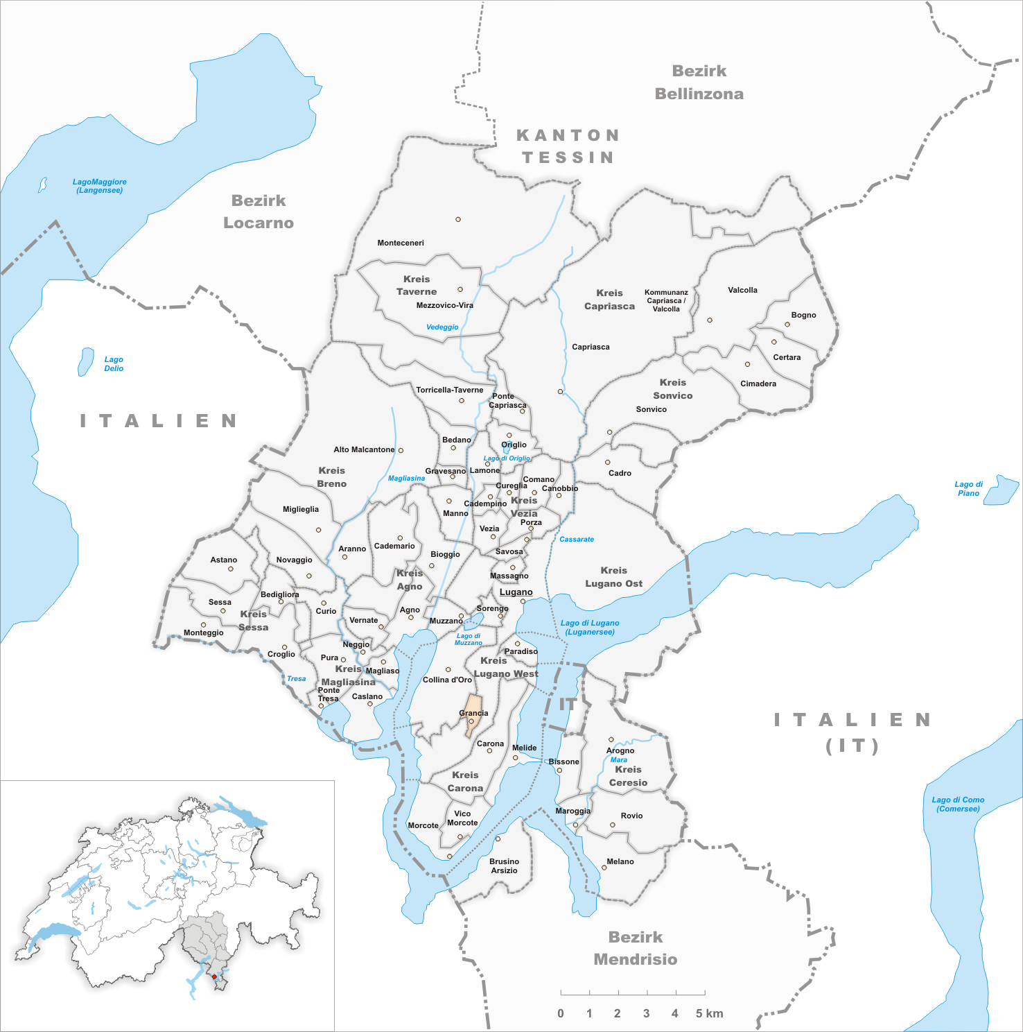 Municipality Grancia